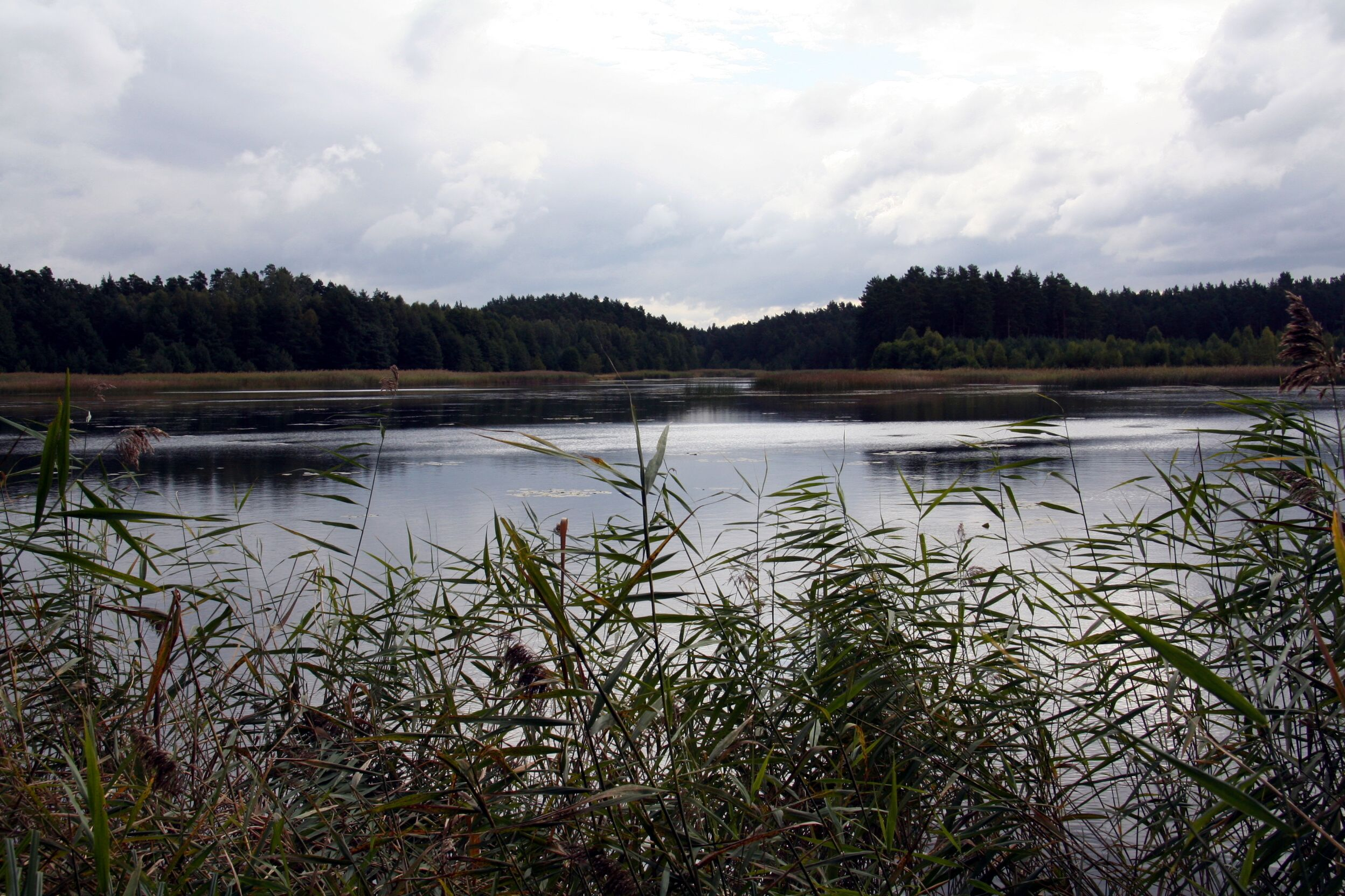 Kummergebirge, Hradcansky Ryb